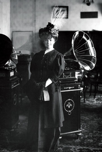 Анастасия Вяльцева - русская эстрадная певица (меццо-сопрано), исполнительница цыганских романсов, артистка оперетты.